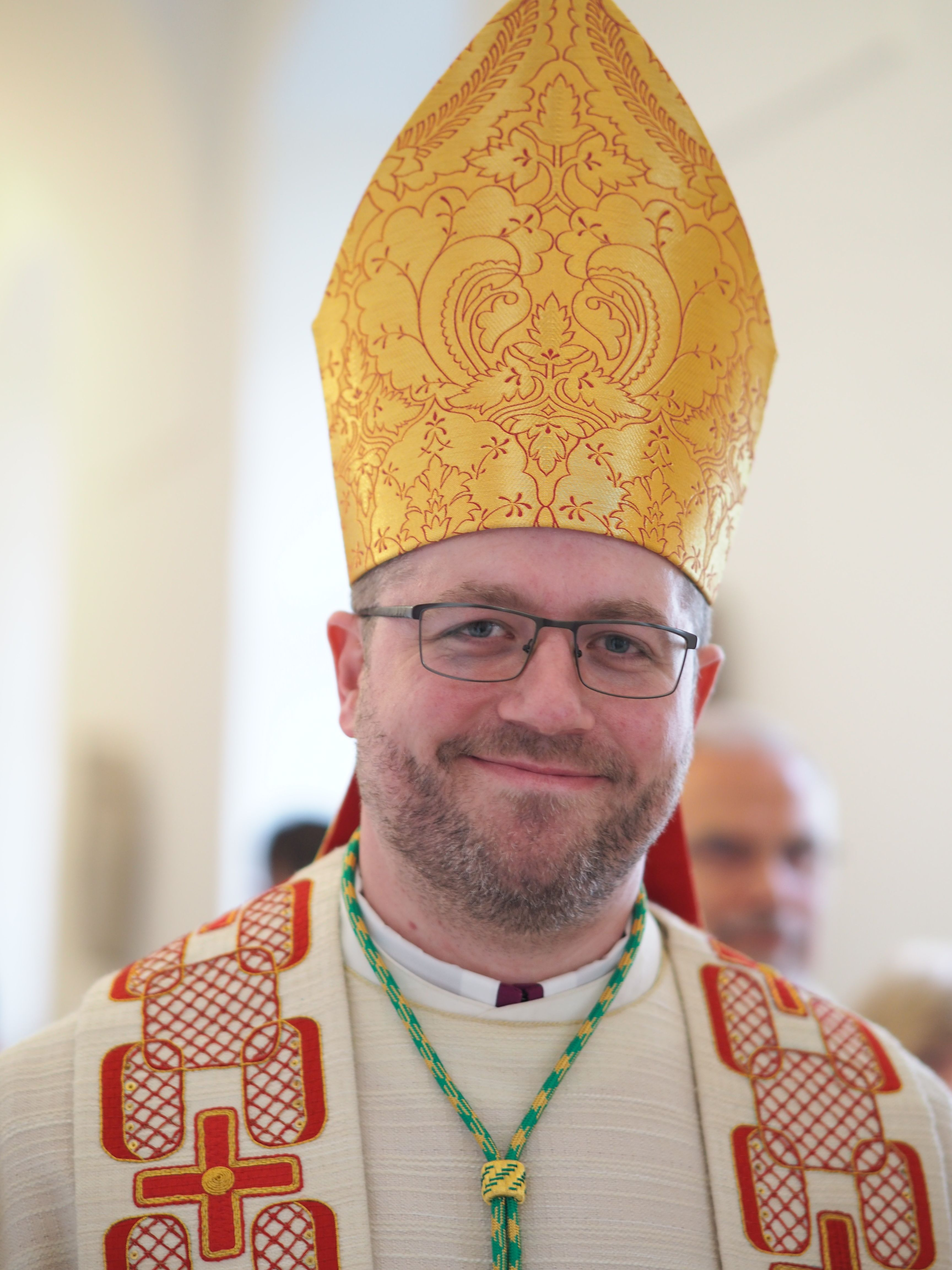 Propst Petrus Stockinger Depicted person: Petrus Stockinger – Austrian clergyman